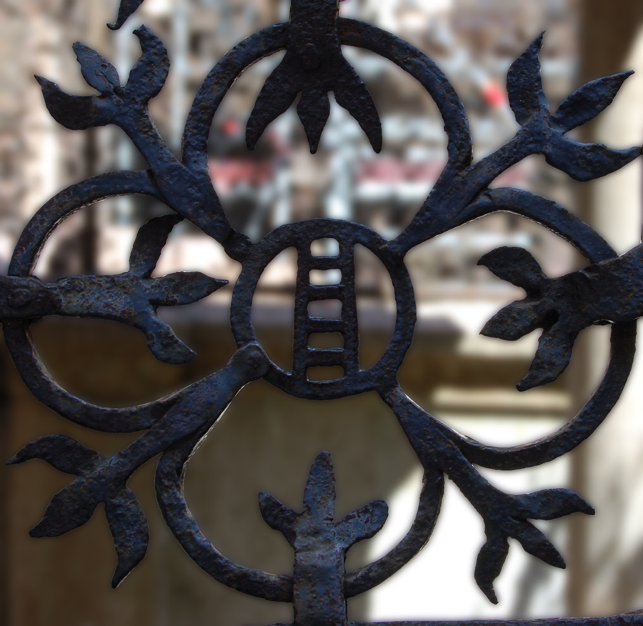 Particolare del cancello delle Arche Scaligere a Verona